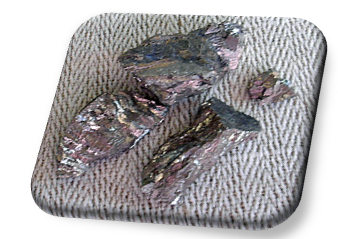 Titan - Ti